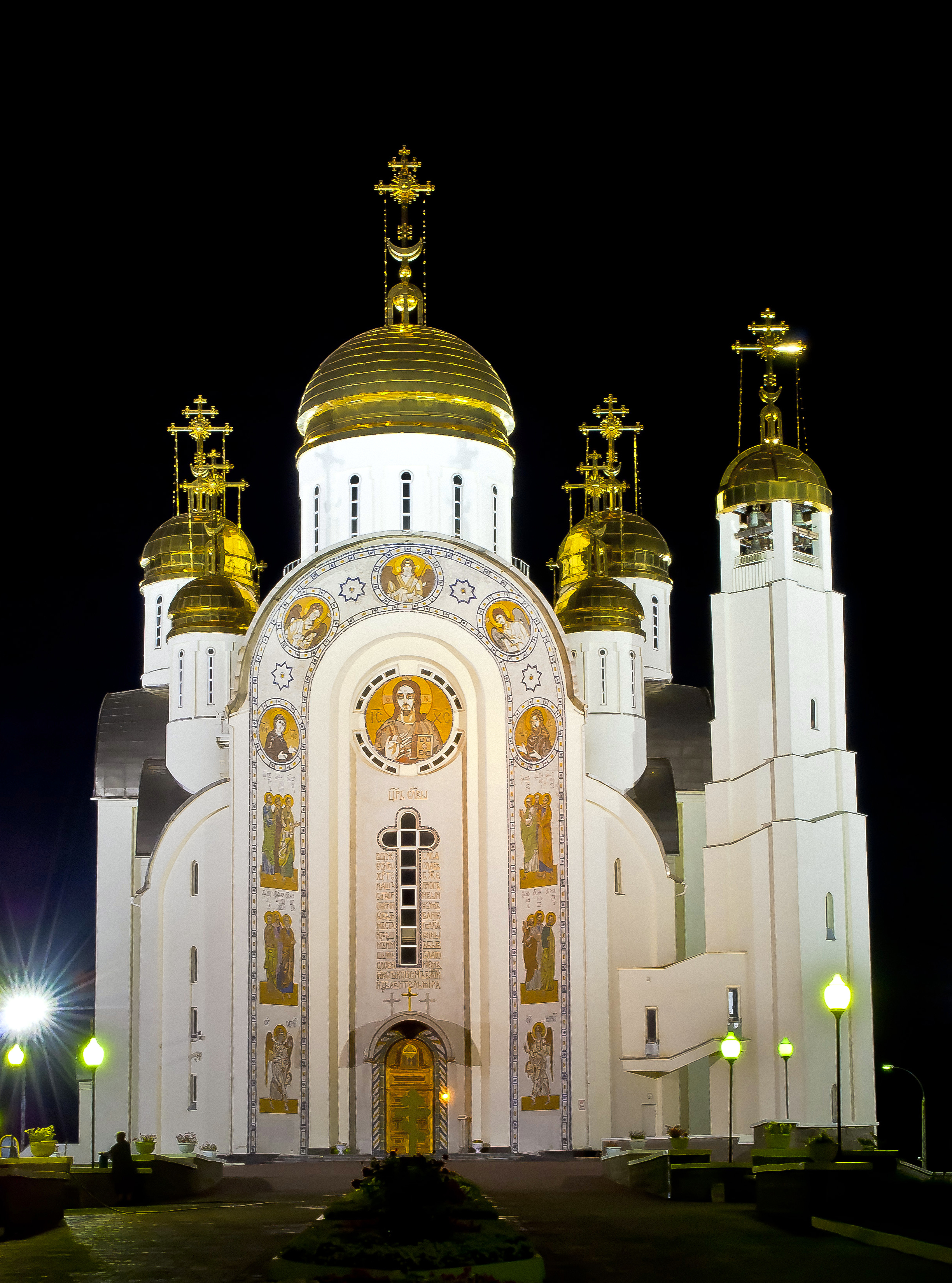 Храм Вознесения Господня (Магнитогорск).